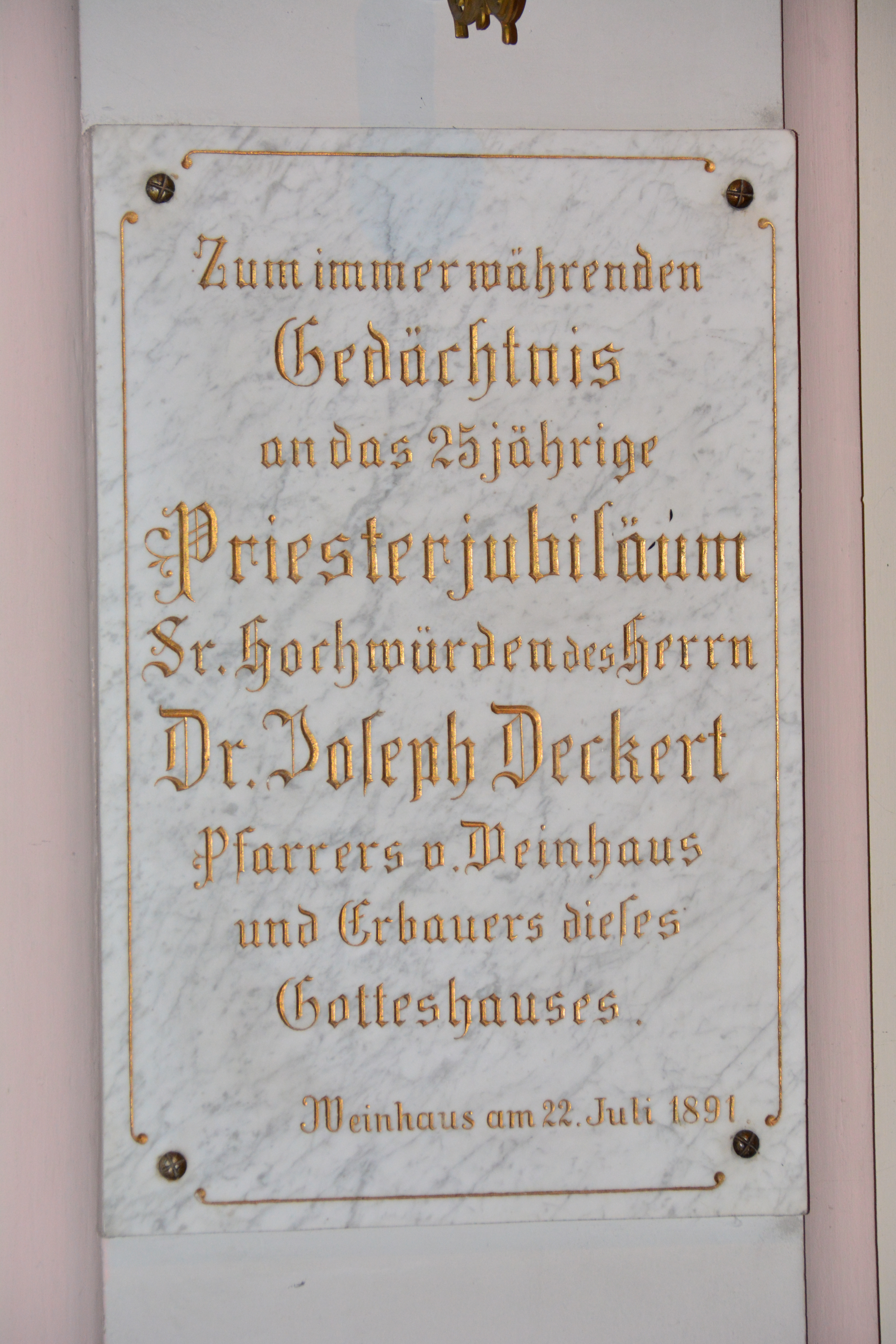 Gedenktafel für Joseph Deckert (Wien, Gentzgasse 140, Kirche)